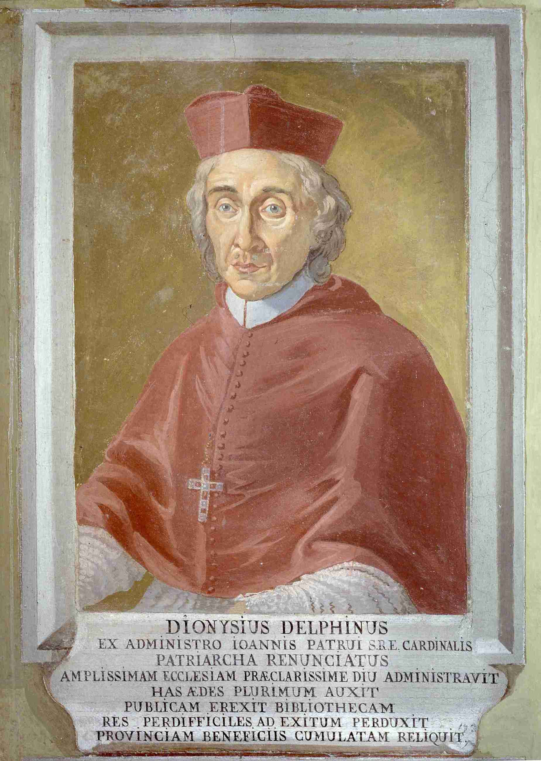 Delfin-Dionisio - Patriarcato Udine